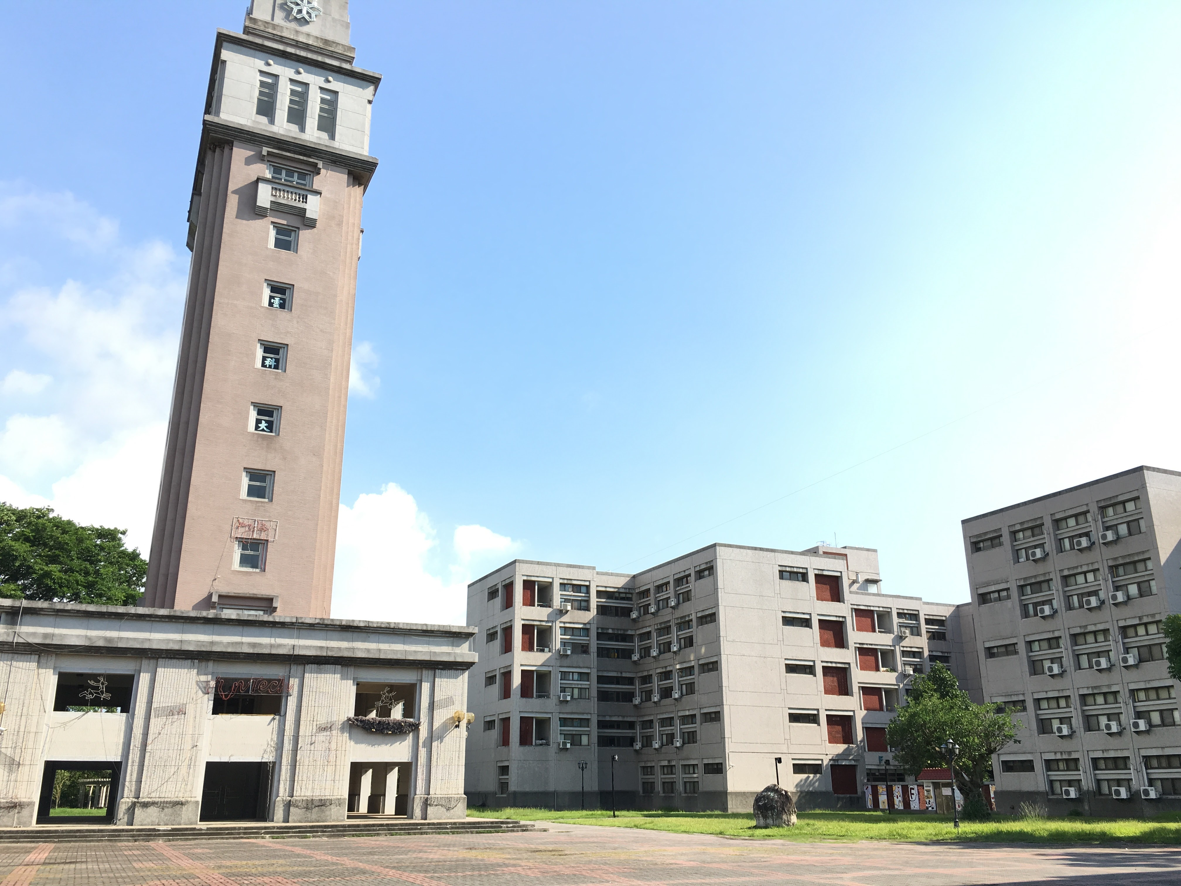 觀雲閣全景